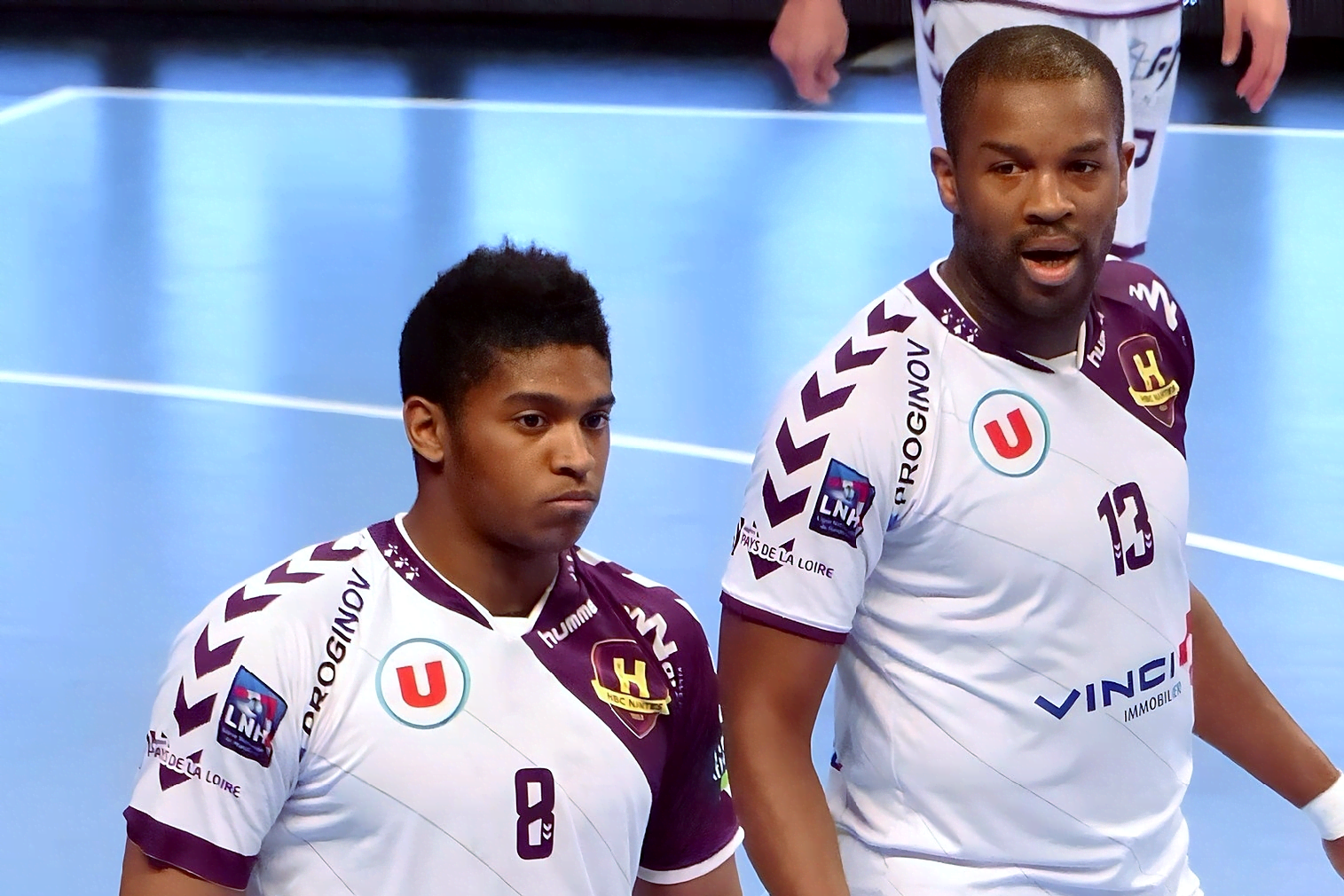 Rock Feliho, arrière gauche du club de handball HBC Nantes, lors du match face au PSG Handball, le 10 avril 2014. Avec son co-équipier O'Brian Nyateu.